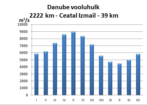 Doonau hüdrograaf